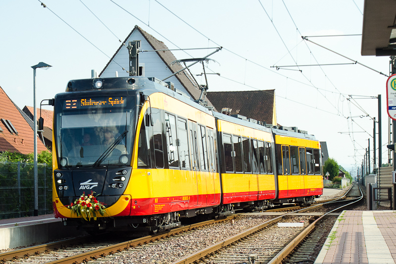 Fahrzeug 923 der Albtal-Verkehrsgesellschaft auf seinem ersten Linieneinsatz im Karlsruher Verkehrsnetz.